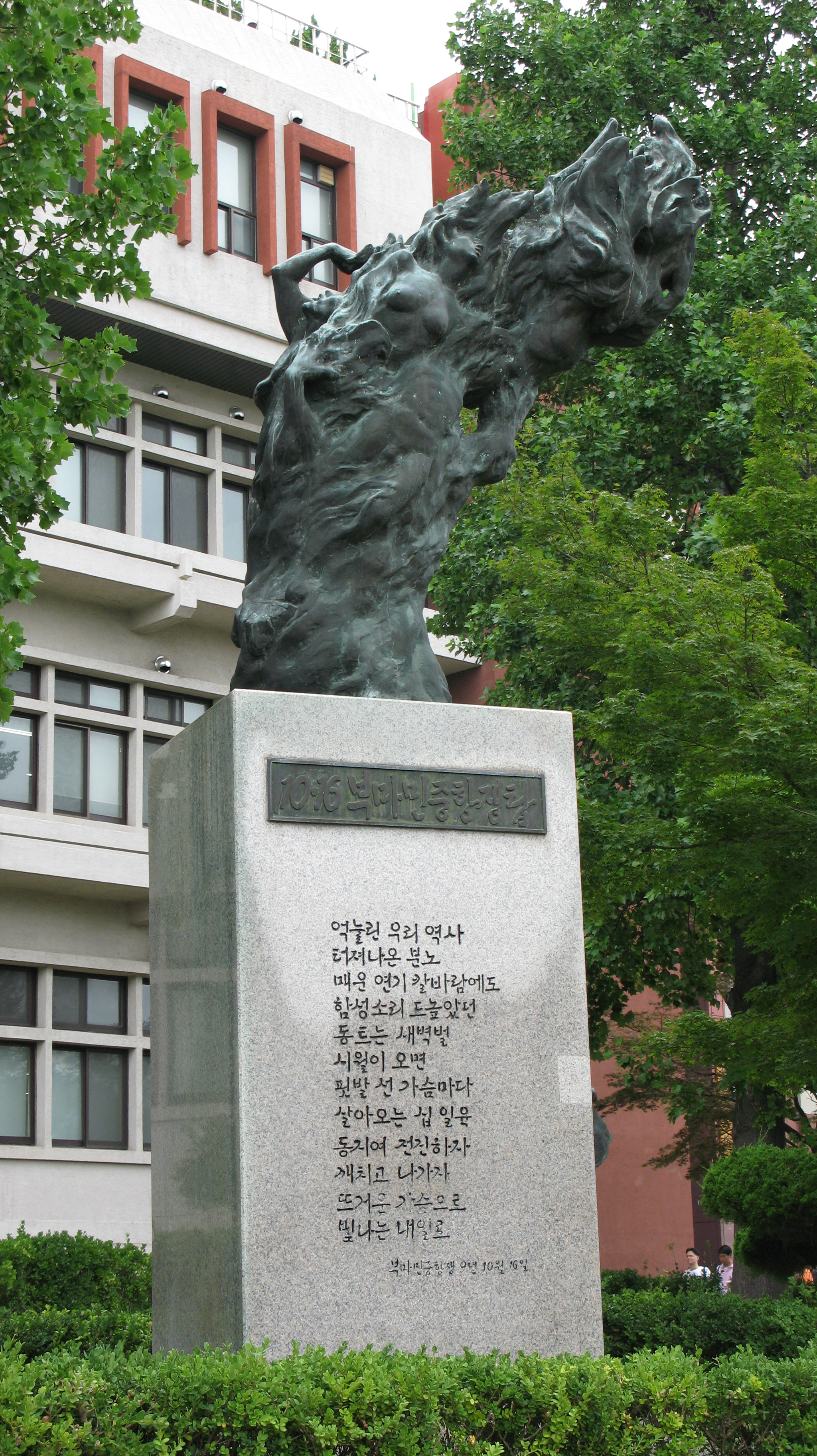 부산대학교 제2도서관 앞에 있는 부마항쟁 기념탑